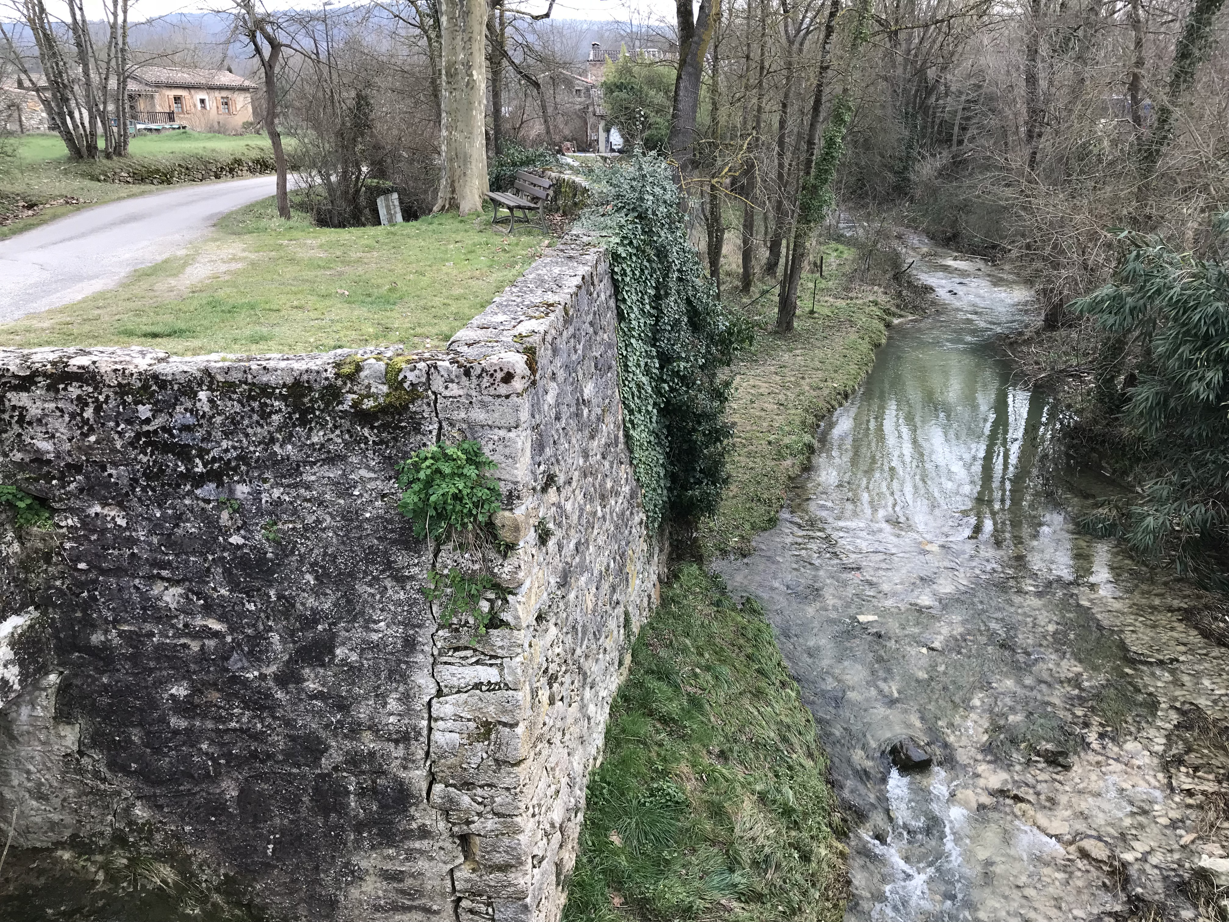 Le ruisseau de Limbrassac dans le village du même nom (Ariège, France).